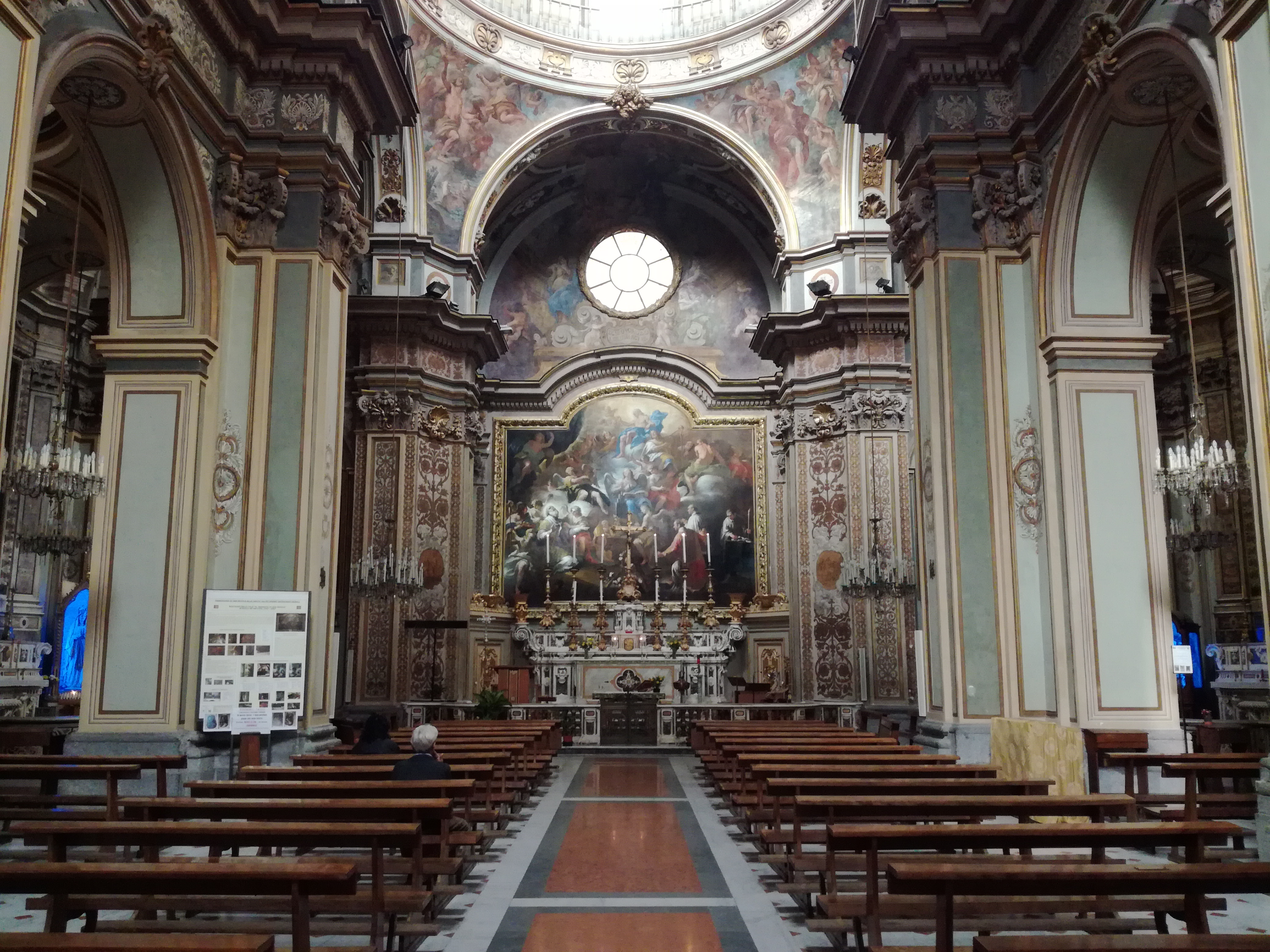 Interno Nicola alla Carità